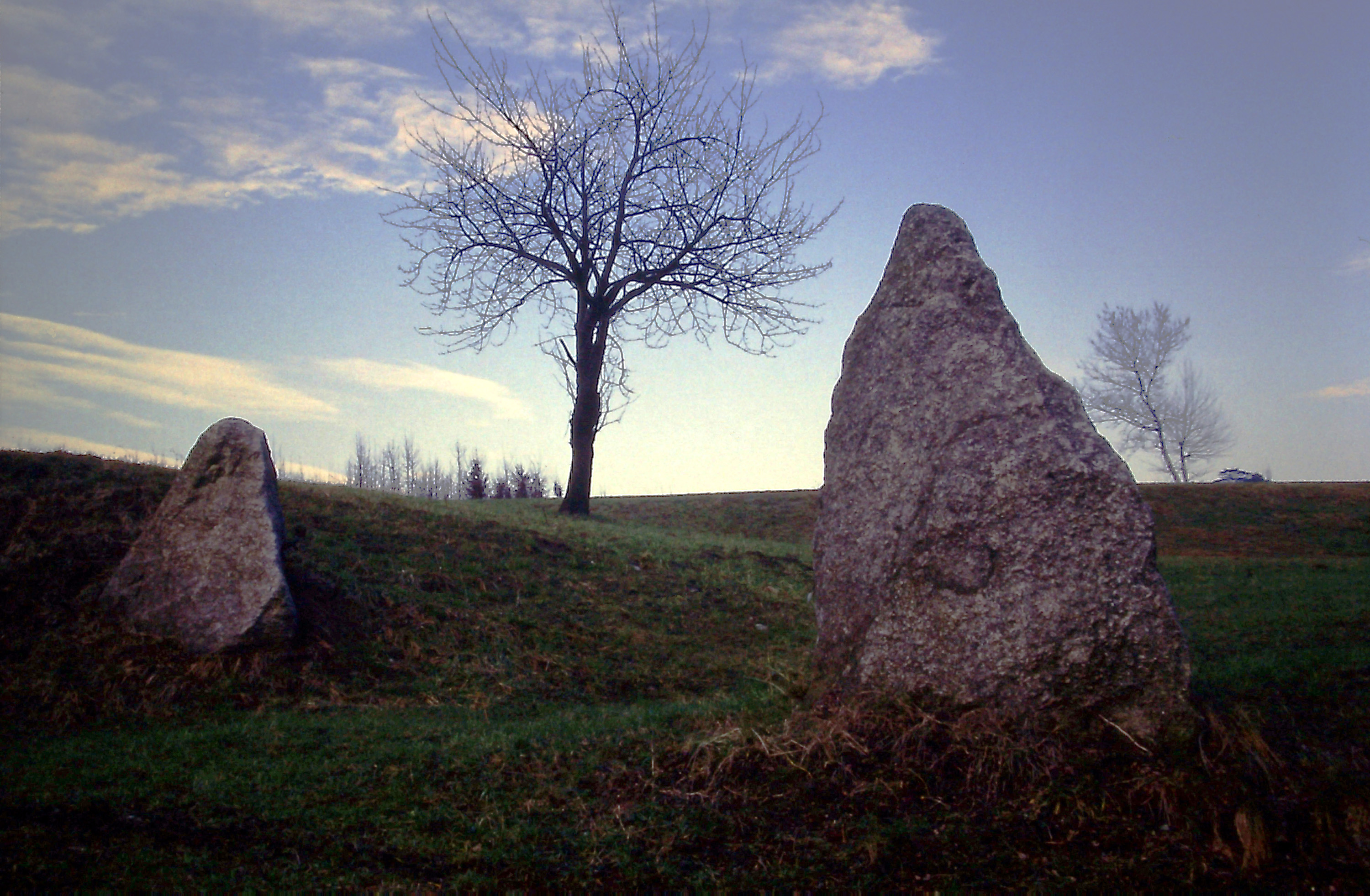 Due antiche pietre che probabilmente, con il menhir di Bulciago (sparito nel 2007) facevano parte di una sorta di recinto sacro all'avello (un masso erratico scavato a tomba) dei Morti dell'Avello di Bulciago (Lecco).